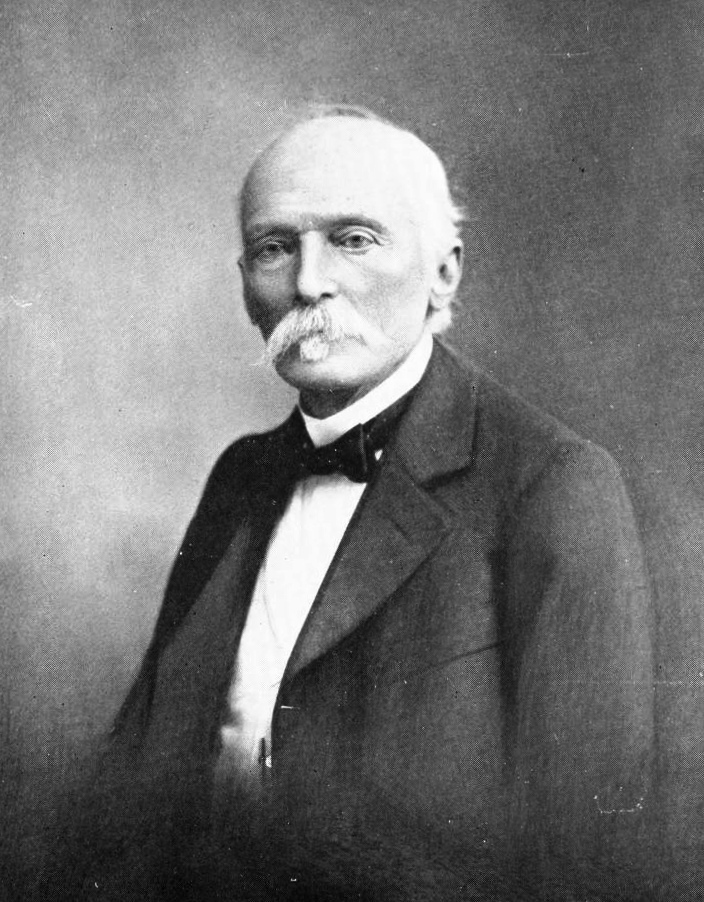 Claude-Francois Jeunet, French entomologist